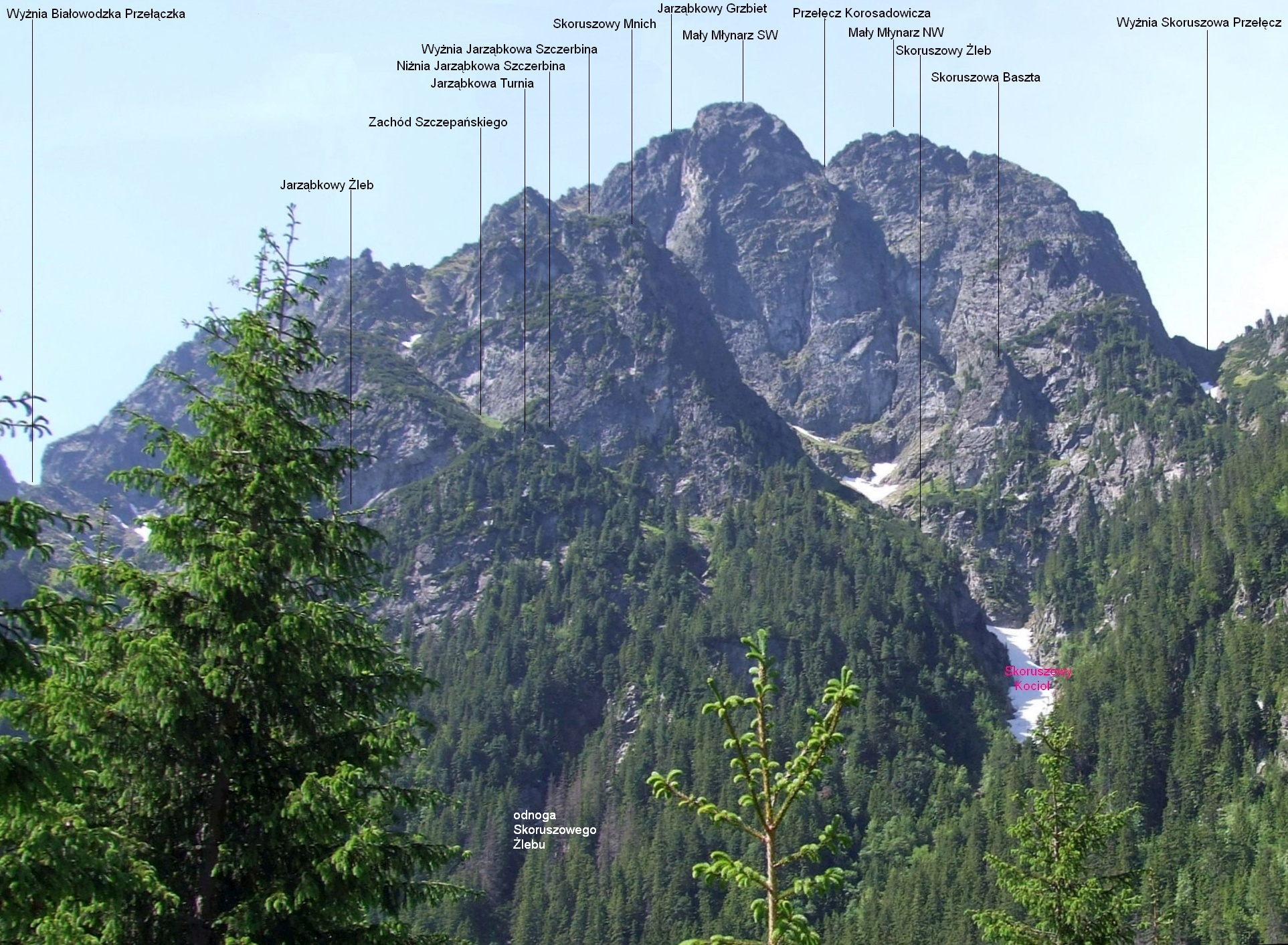 Mały Mlynarz. Widok z Doliny Białej Wody